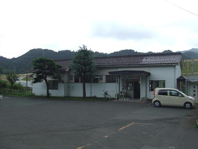 JR加斗駅の駅舎